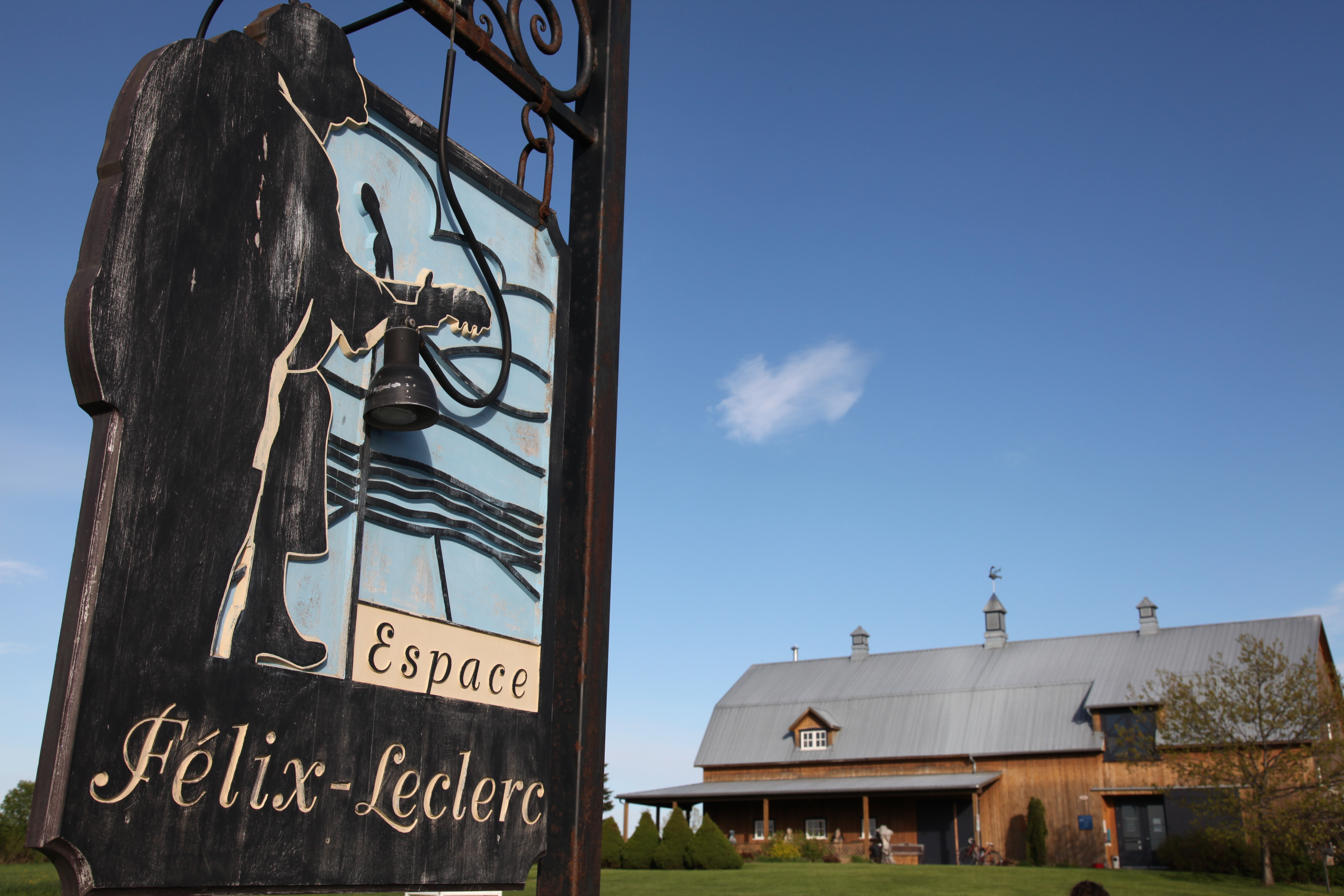 L'arrondissement historique de l'Île-d'Orléans, décrété en 1970, est un territoire à caractère rural couvrant la totalité de cette île, d'une longueur approximative de 34 km et d'une largeur maximale de 8 km. Une crête centrale couverte en majeure partie de forêt relie les pointes formant ses extrémités. Son relief est marqué par une série de terrasses qui s'étagent depuis les rives. Le lotissement régulier, issu du régime seigneurial, rythme le paysage. Vue du ciel, l'île apparaît comme une succession de terres rectangulaires étroites et allongées, disposées de part et d'autre d'une ligne longitudinale, qui ont front sur le fleuve Saint-Laurent. Maisons anciennes, dépendances agricoles, résidences de villégiature, constructions contemporaines, noyaux villageois, anses, estran, boisés et falaises animent ce paysage qui porte la trace de plus de trois siècles d'histoire.